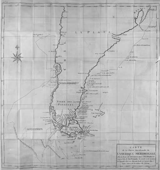 [Illustrations de Voyage autour du monde] Auteur : George Anson Éditeur : Henri-Albert Gosse et Compagnie (Genève) 1750